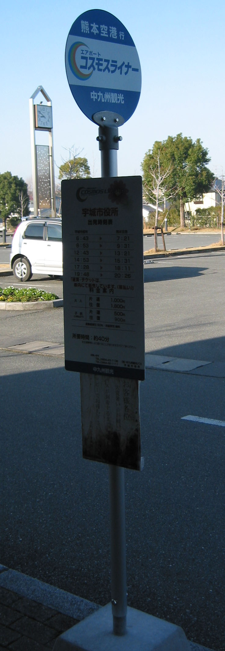 中九州観光 空港バス「コスモスライナー」のバス停